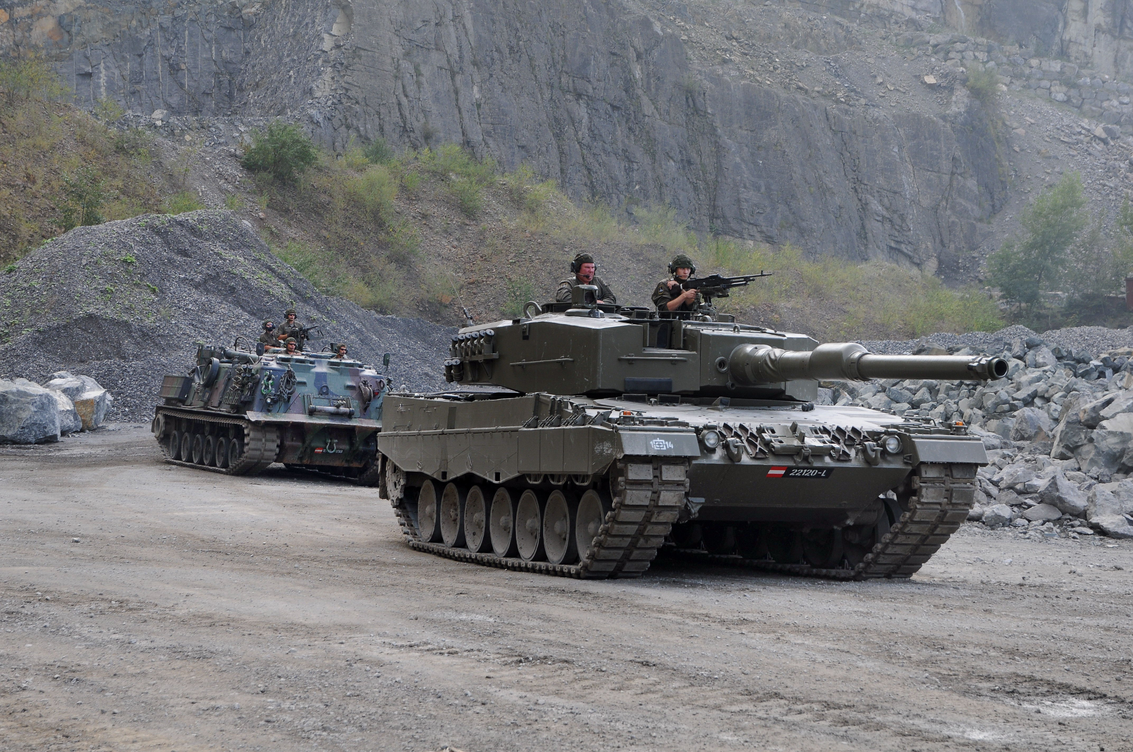 Im Zuge einer Road-Show zeigte das Österreichische Bundesheer im Dornbirner / Hohenemser Steinbruch den Kampfpanzer Leopard 2A4. Er ist das Hautwaffensystem der österreichischen Panzertruppe. Als Hauptwaffe verfügt der Panzer über eine 120 Millimeter Kanone. Die starke Motorisierung sorgt trotz der starken Panzerung für die enorme Beweglichkeit des Fahrzeuges.